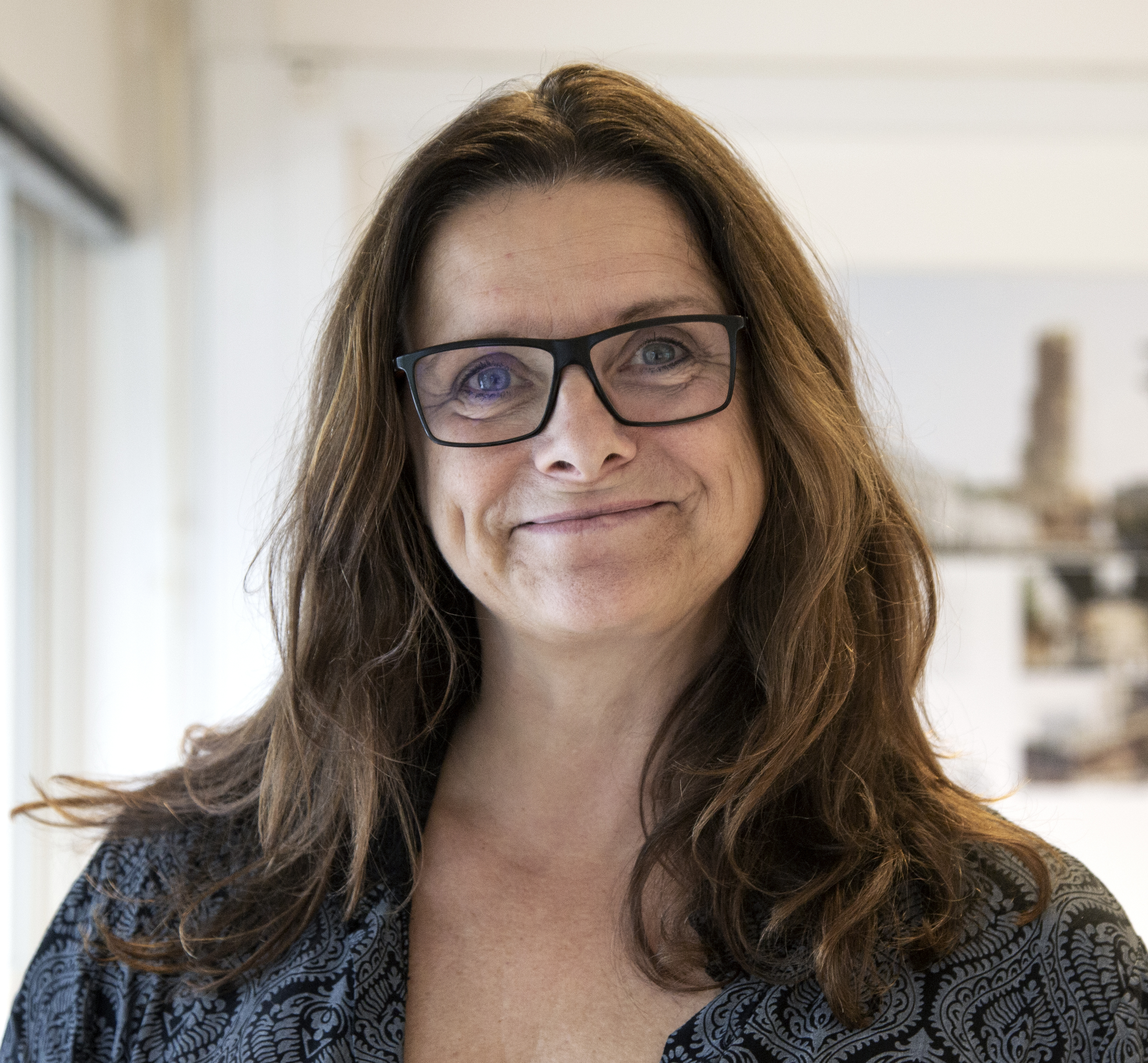 Lone Wiggers, arkitekt och partner C.F. Møller Architects, 2019-09-10. Photo: News Øresund - Jenny Andersson © News Øresund - Jenny Andersson (CC BY 3.0). Detta verk av News Øresund är licensierat under en Creative Commons Erkännande 3.0 Unported-licens (CC BY 3.0). Bilden får fritt publiceras under förutsättning att källa anges. .The picture can be used freely under the prerequisite that the source is given. News Øresund, Malmö, Sweden News Øresund är en oberoende regional nyhetsbyrå som är en del av det oberoende dansk-svenska kunskapscentrat Øresundsinstituttet.. .